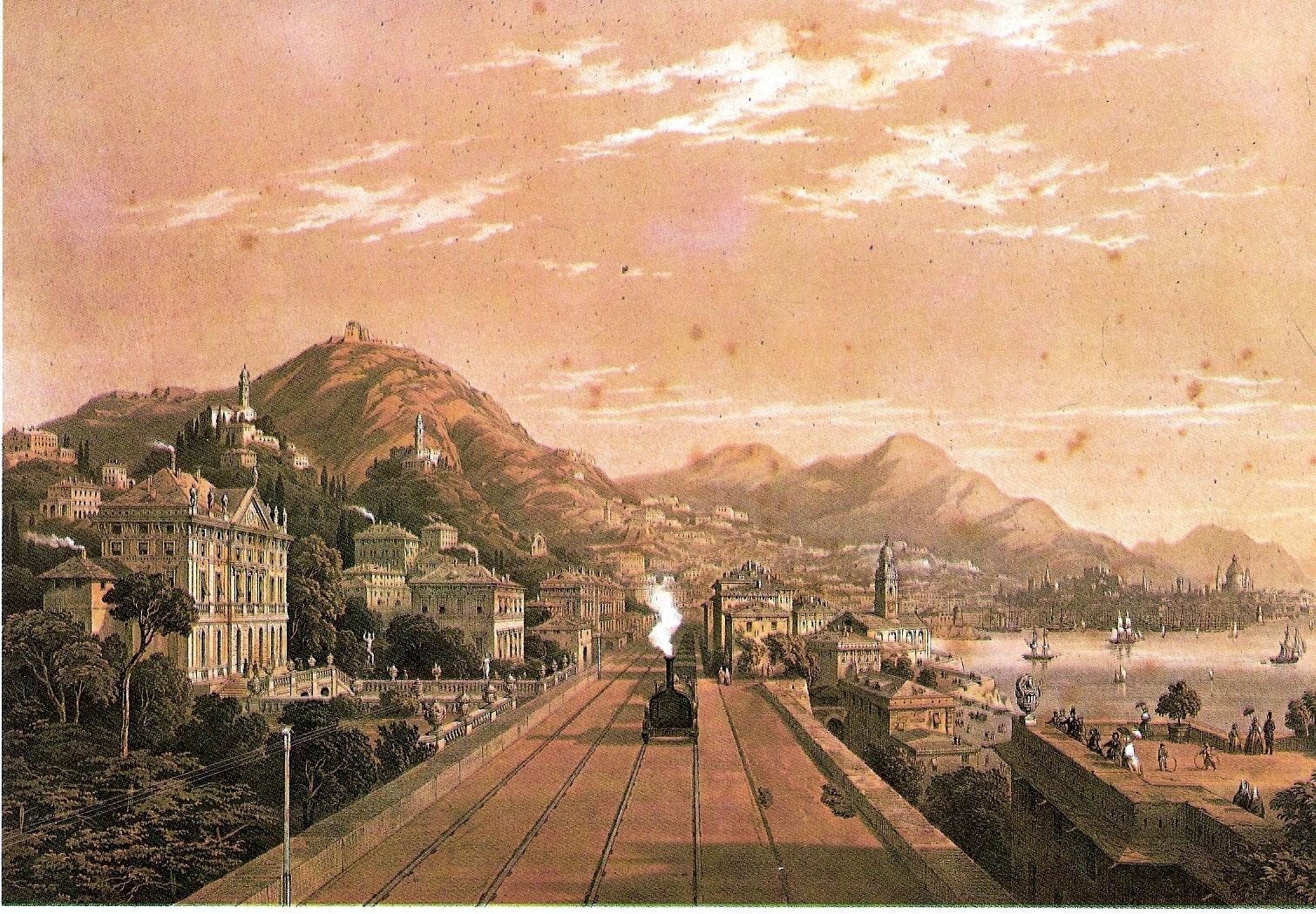 Dipinto raffigurante l'inaugurazione della tratta ferroviaria tra la zona di Principe e Sampierdarena. Nell'immagine è visibile villa Rosazza, sede attuale della Fondazione Casa America